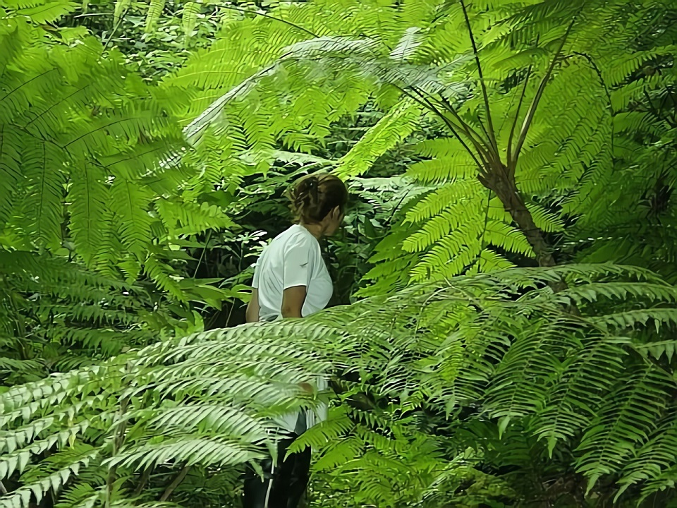 Helechos en Mbatovi